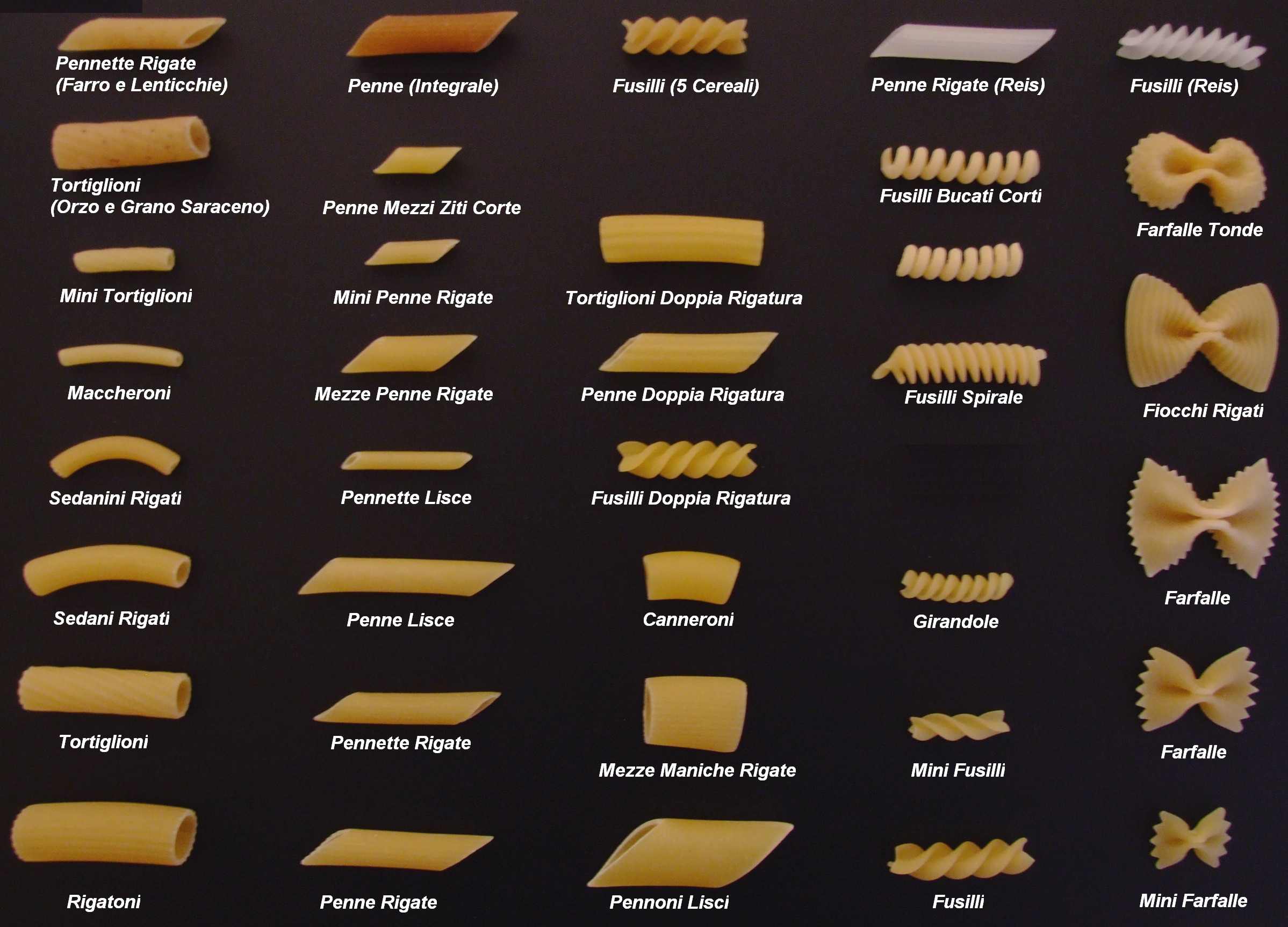 Quelle: selbst fotografiert, 11/2006 Fotograf: Späth Chr.